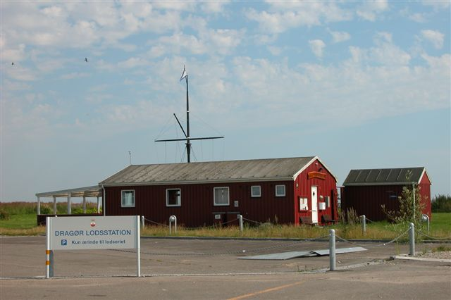 Lodsstationen, Dragør